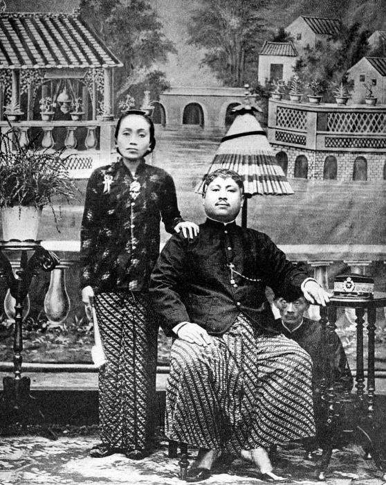 Repronegatief. Gedurende de 19e eeuw en een deel van de 20e eeuw was Java bestuurlijk verdeeld in tussen de 20 en 25 Residenties (de aantallen wisselden door opsplitsingen en samenvoegingen). Op hun beurt waren de Residenties verdeeld in Regentschappen die bestuurd werden door een zogeheten Regent (bupati), buiten de Vorstenlanden de hoogste plaatselijke inheemse functionaris. De Regenten en hun familieleden vormden de Javaanse aristocratie, de erfelijke ambtsadel. Op de foto is achter de Regent het officiële zonnescherm te zien dat bij zijn rang hoorde. (P. Boomgaard, 2001). Portret van de regent van Poerwokerto, Banjoemas, met zijn echtgenote